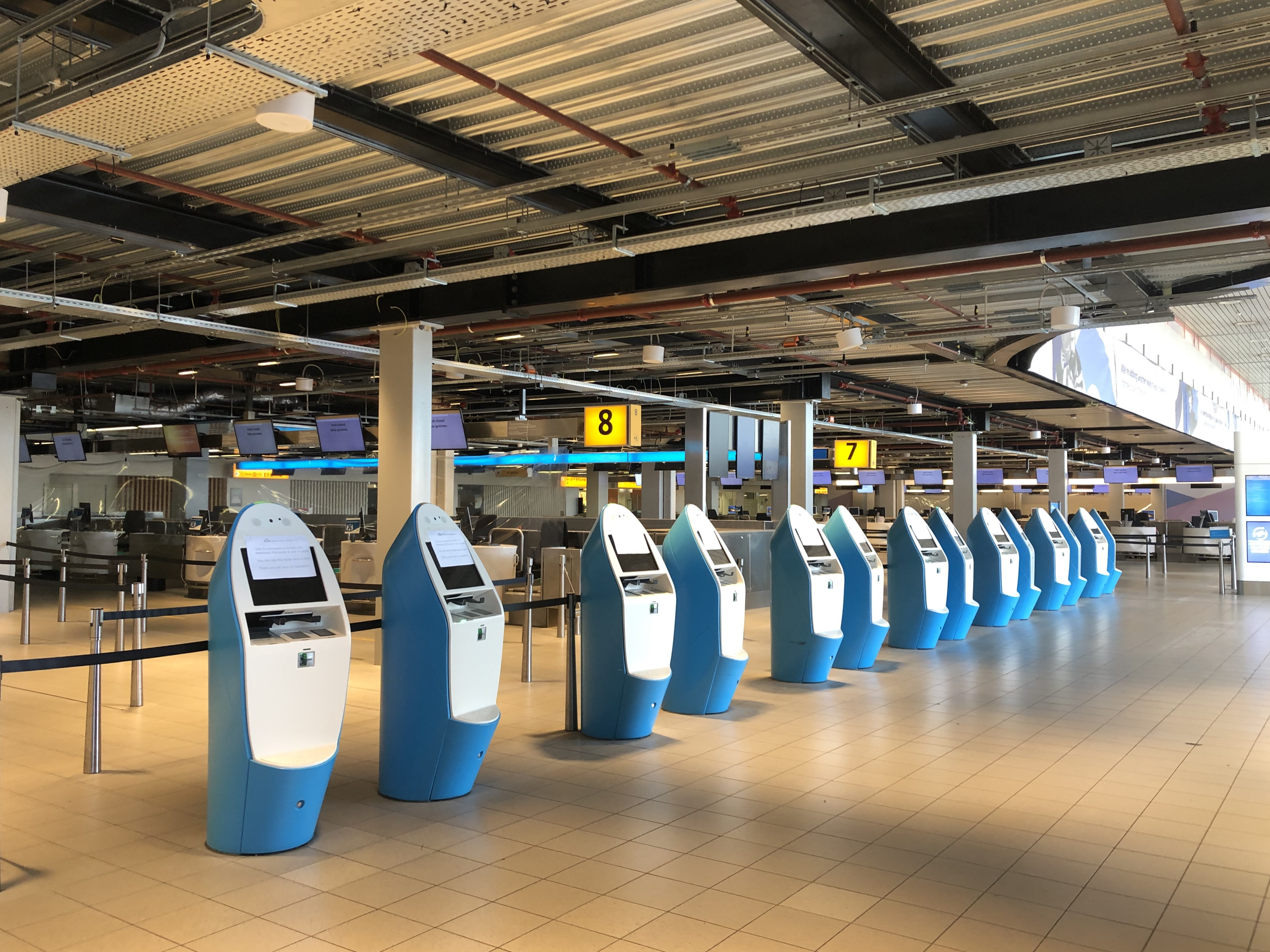 Schiphol tijdens de coronacrisis in 2020